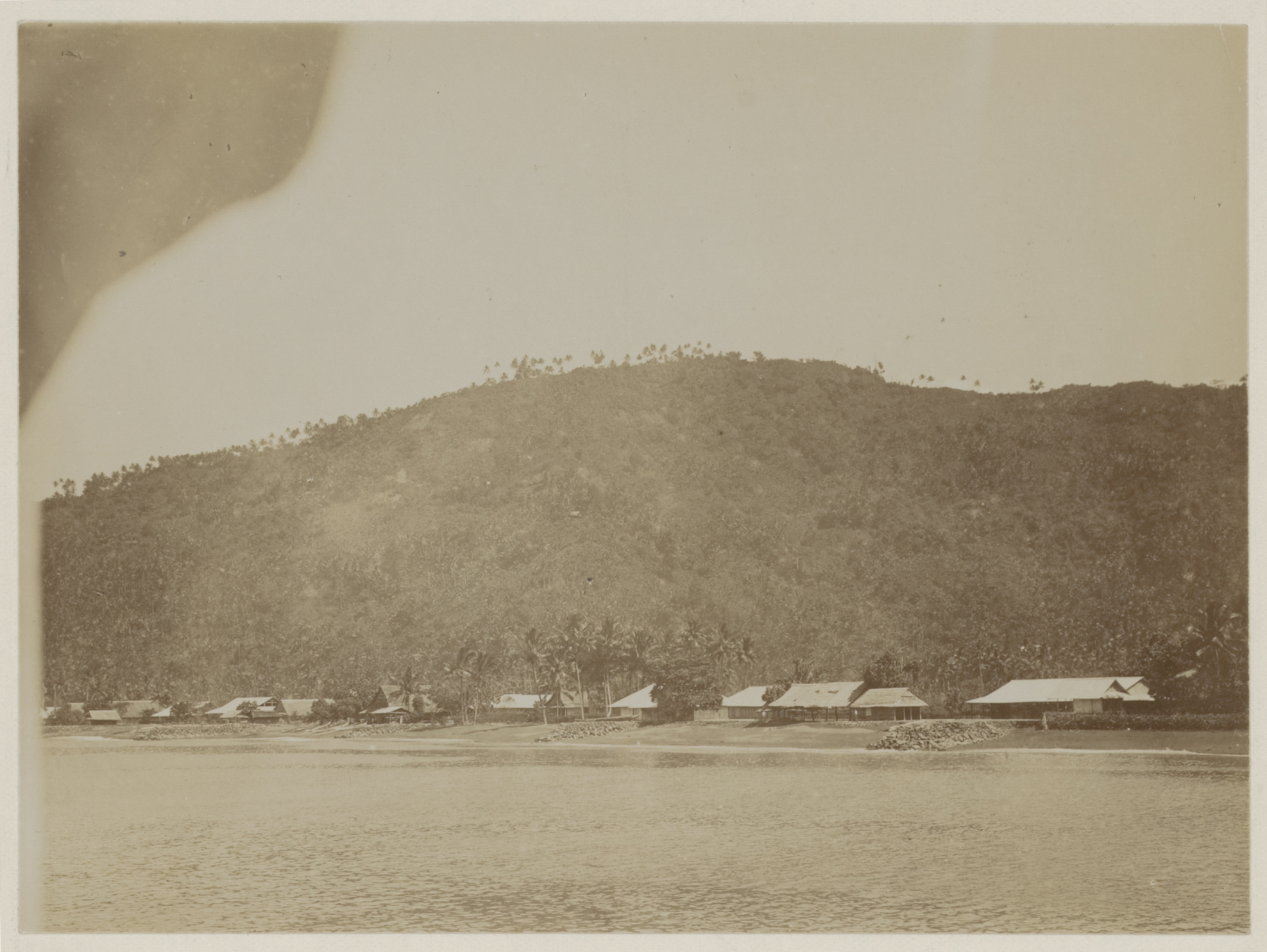 Academische Collecties: 1899-1900, Siboga-expeditie naar Nederlands Oost-Indië, onder leiding van Max Wilhelm Carl Weber Gezicht op de kampong, gelegen op het eiland Salibabu.